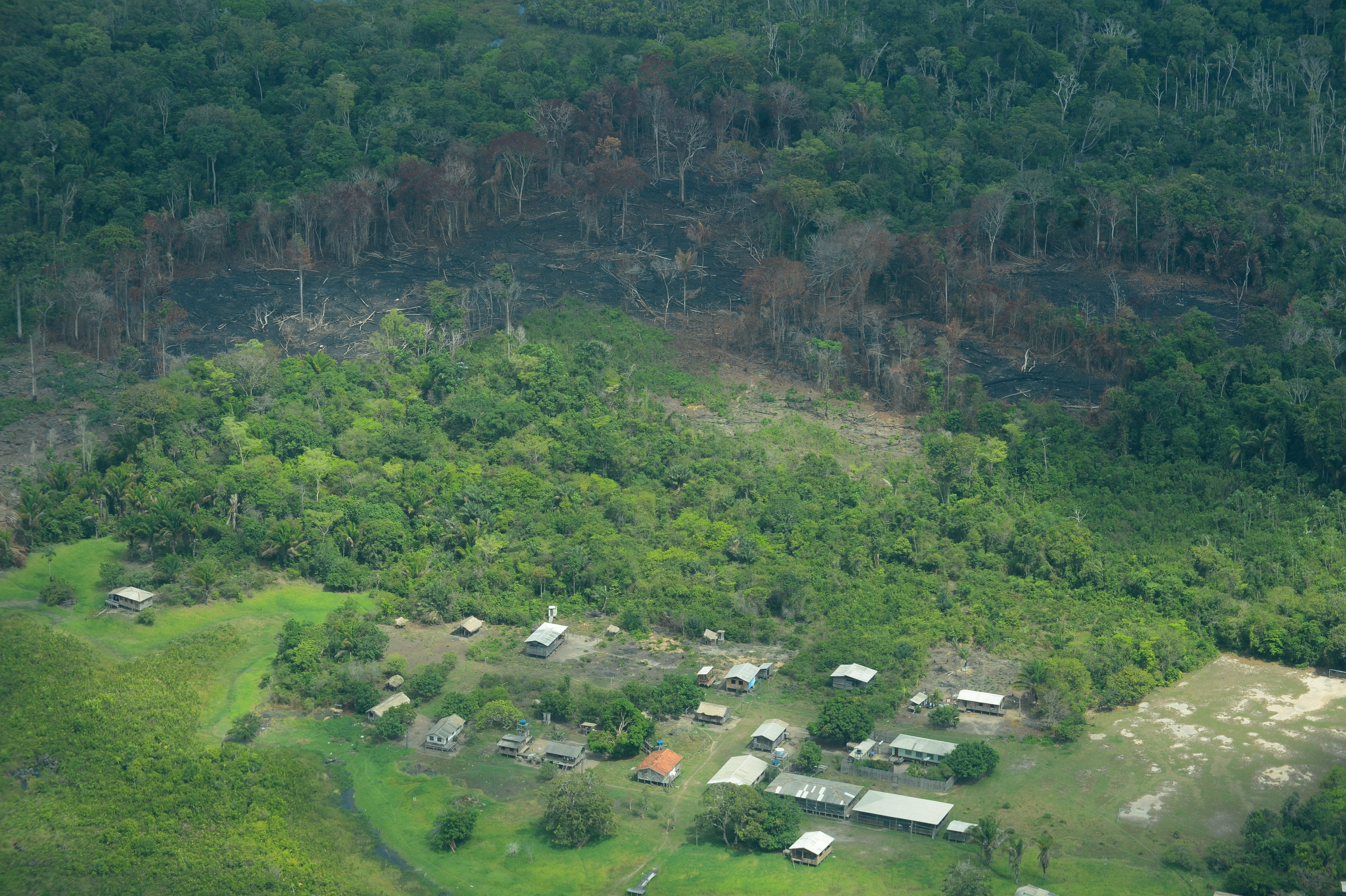 Sobrevoo realizado em áreas de desmatamento na região de Gurupá-Melgaço, em novembro de 2013. Foto: Antonio Cruz / Agência Brasil